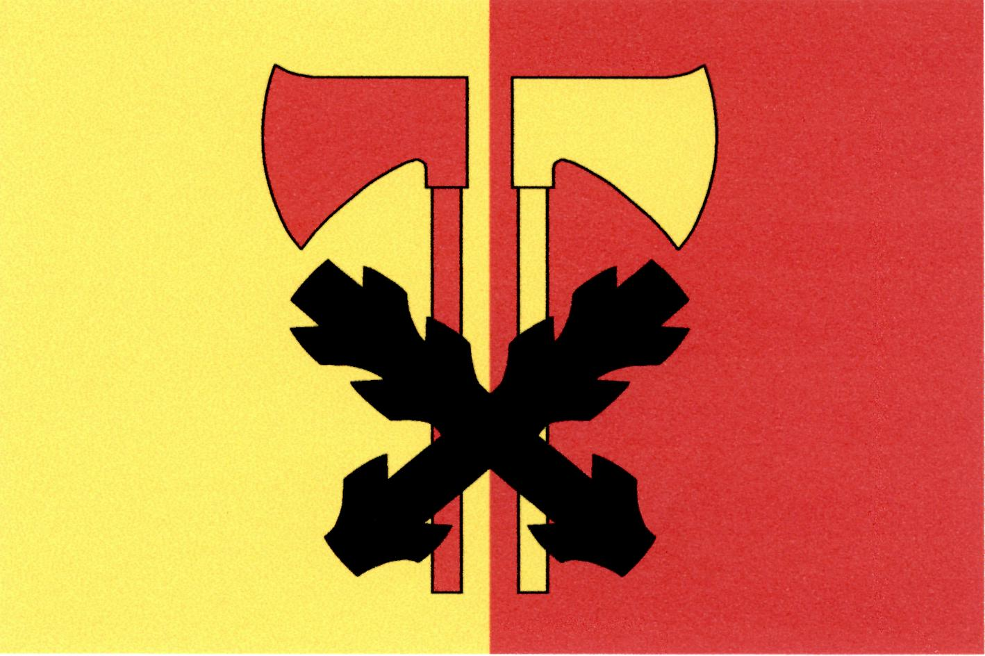 Vlajka obce Janov v okrese Děčín